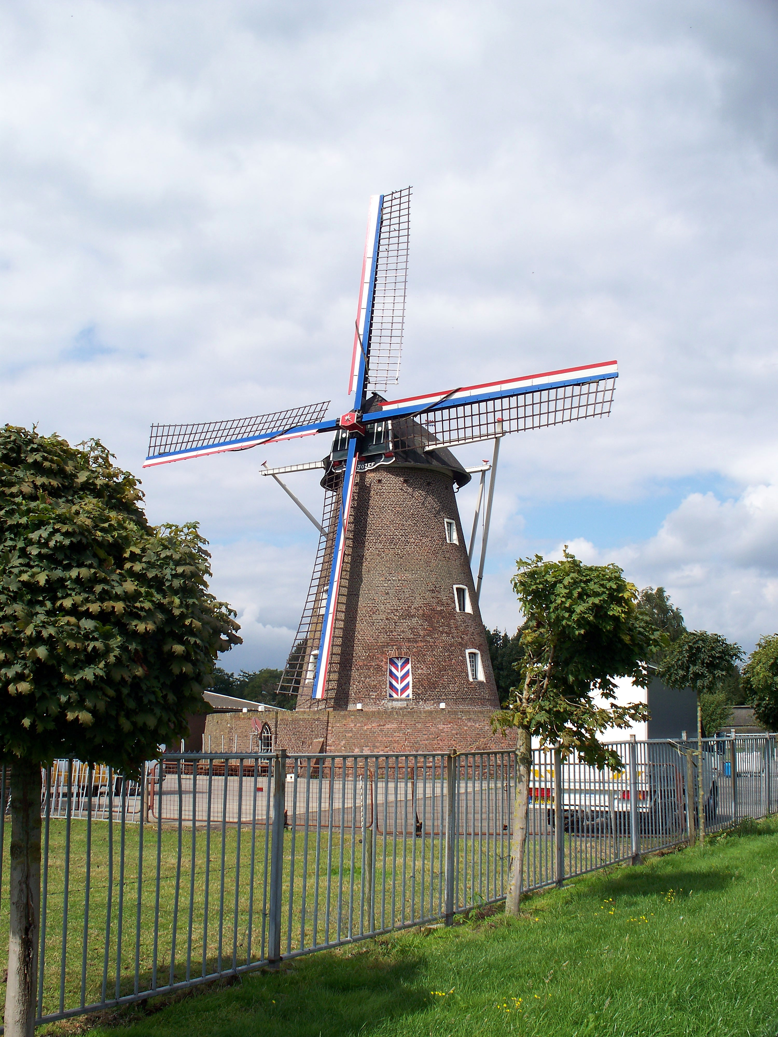 Windmolen Sint Joseph te Nederweert, Kreijel